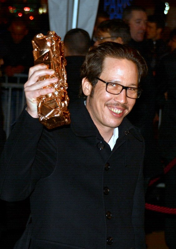 Reda Kateb à la cérémonie des César